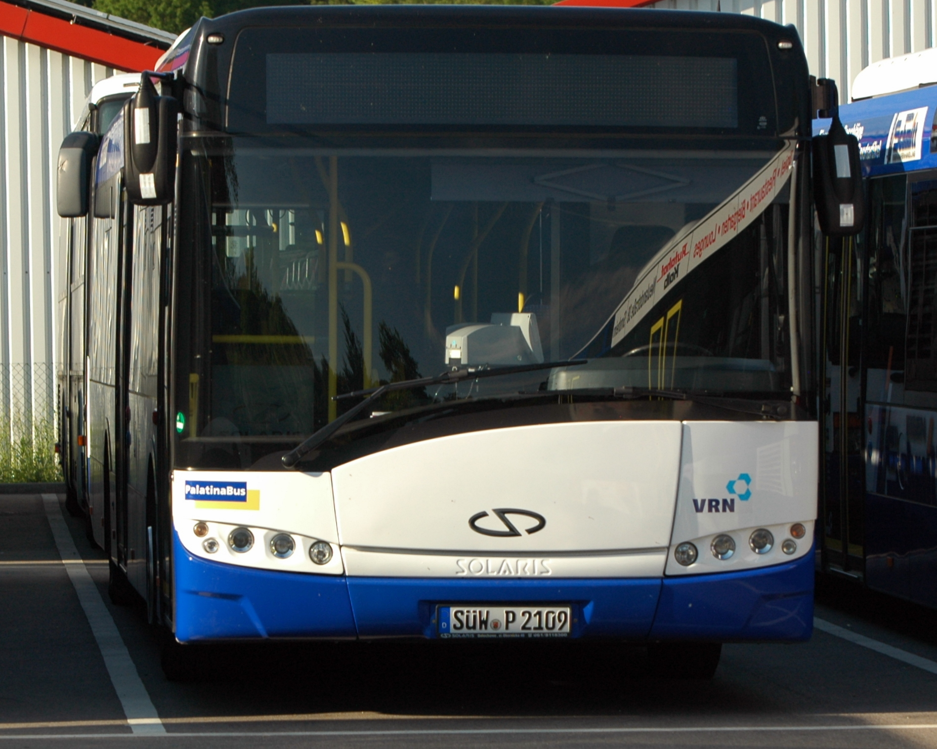 Waibstadt - PalatinaBus - Solaris - SÜW-P 2109